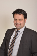 Meinhard Durnwalder, politica italiana